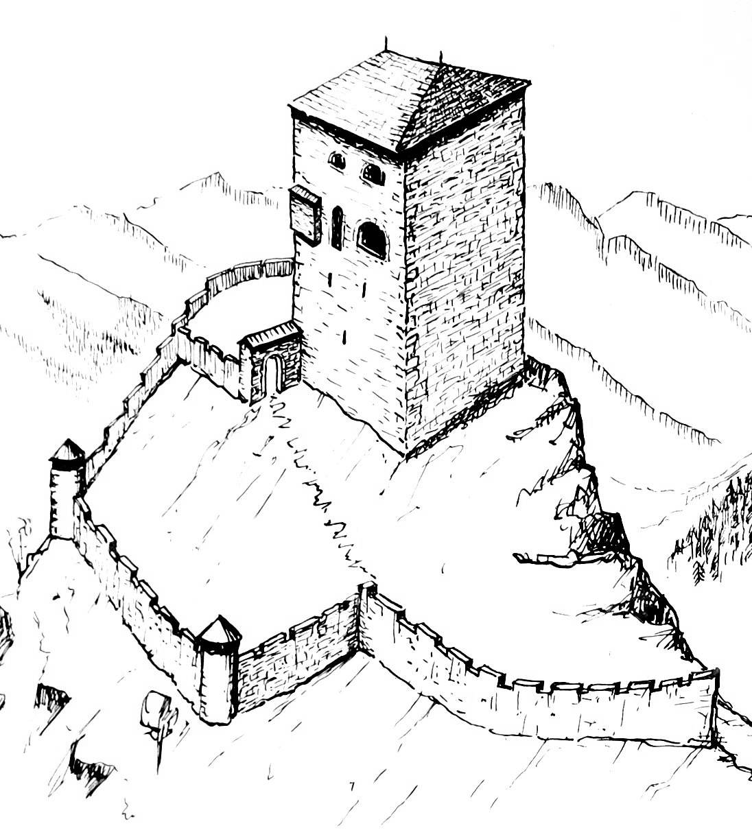 Felsenburg (Kandergrund). Rekonstruktion, vermutetes Aussehen vor 1400.